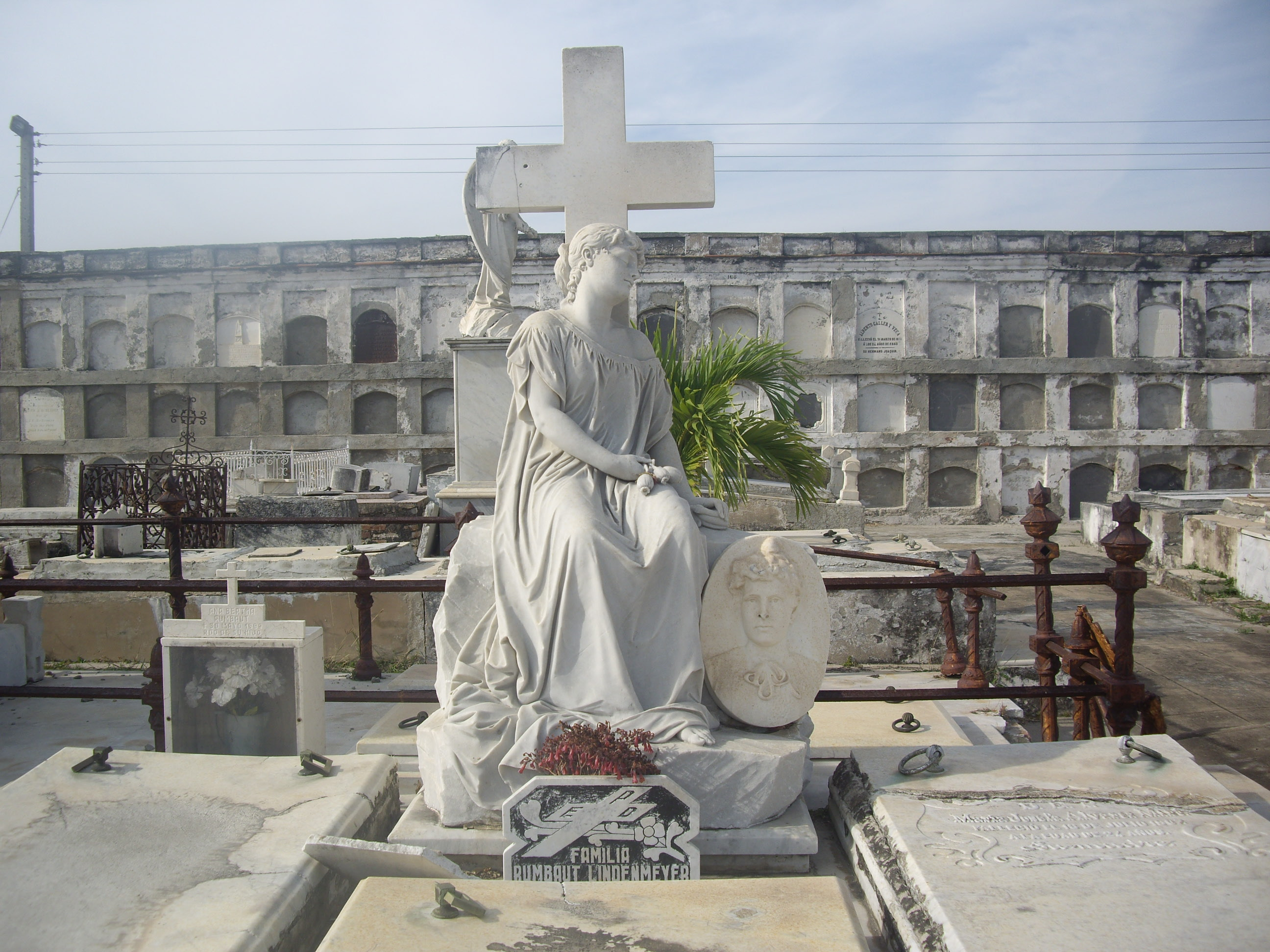 Escultura de "La Bella Durmiente" en el cementiri Reina. Cienfuegos, Cuba